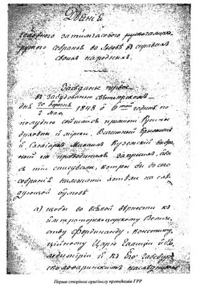 Первая страница протоколов "Главной русской рады" во Львове, 1848